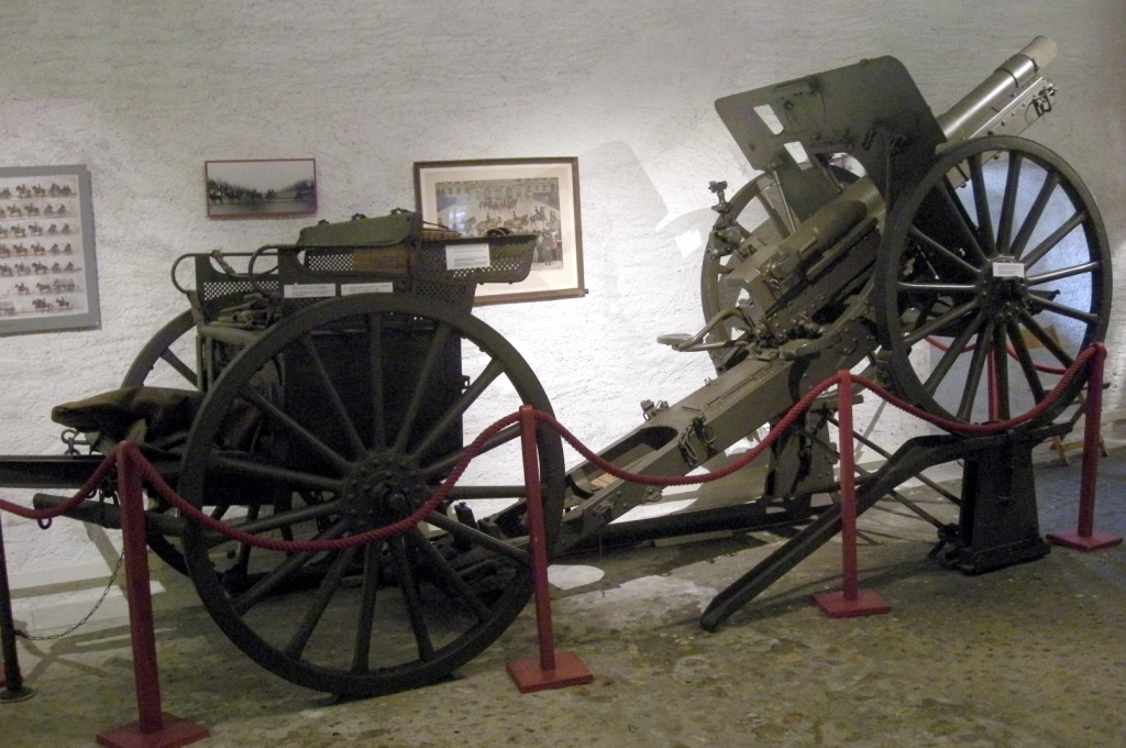 7,5 Kanone 03/22 L30 Sulzer